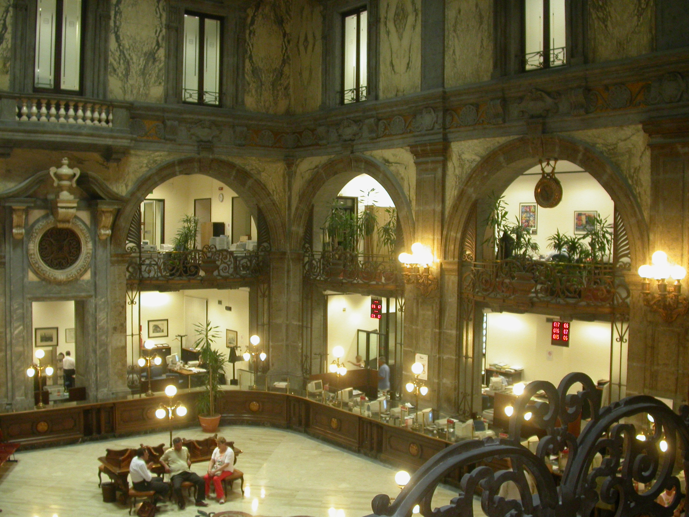 Salone Centrale Palazzo Colonna di Stigliano - Napoli